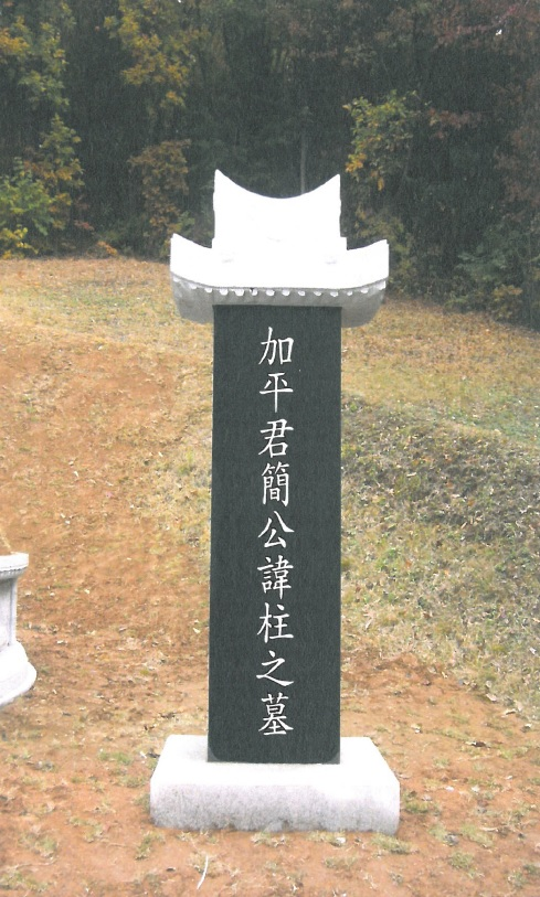 가평 간씨 주(柱,3세)의 묘